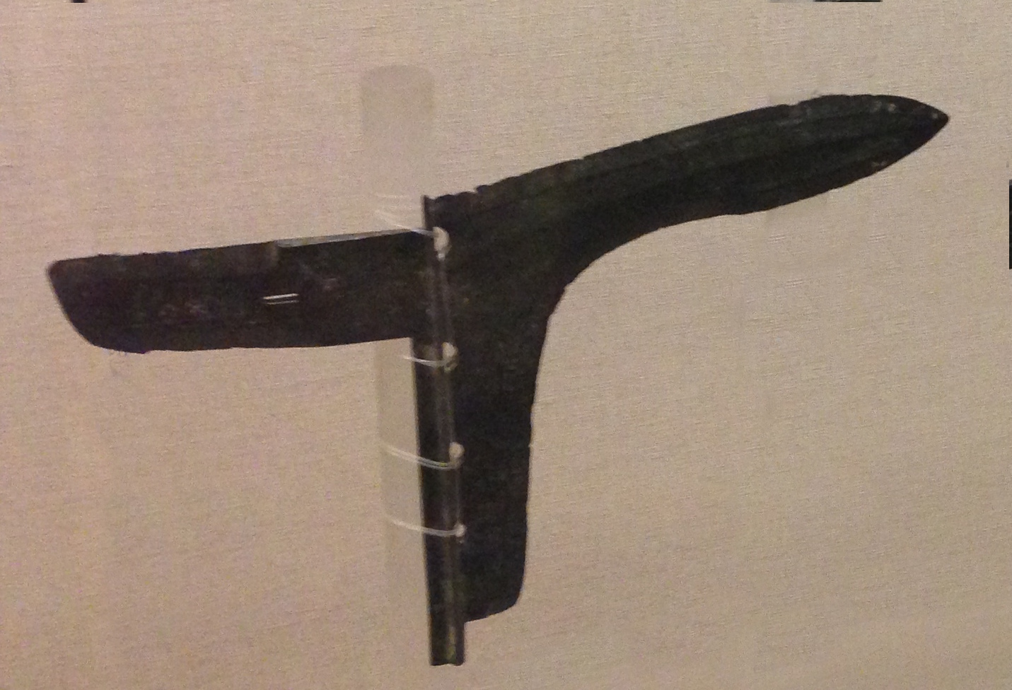 Hillebard från Terrakottaarmén från kinesiska Qindynastin. (221-206 f.Kr.)